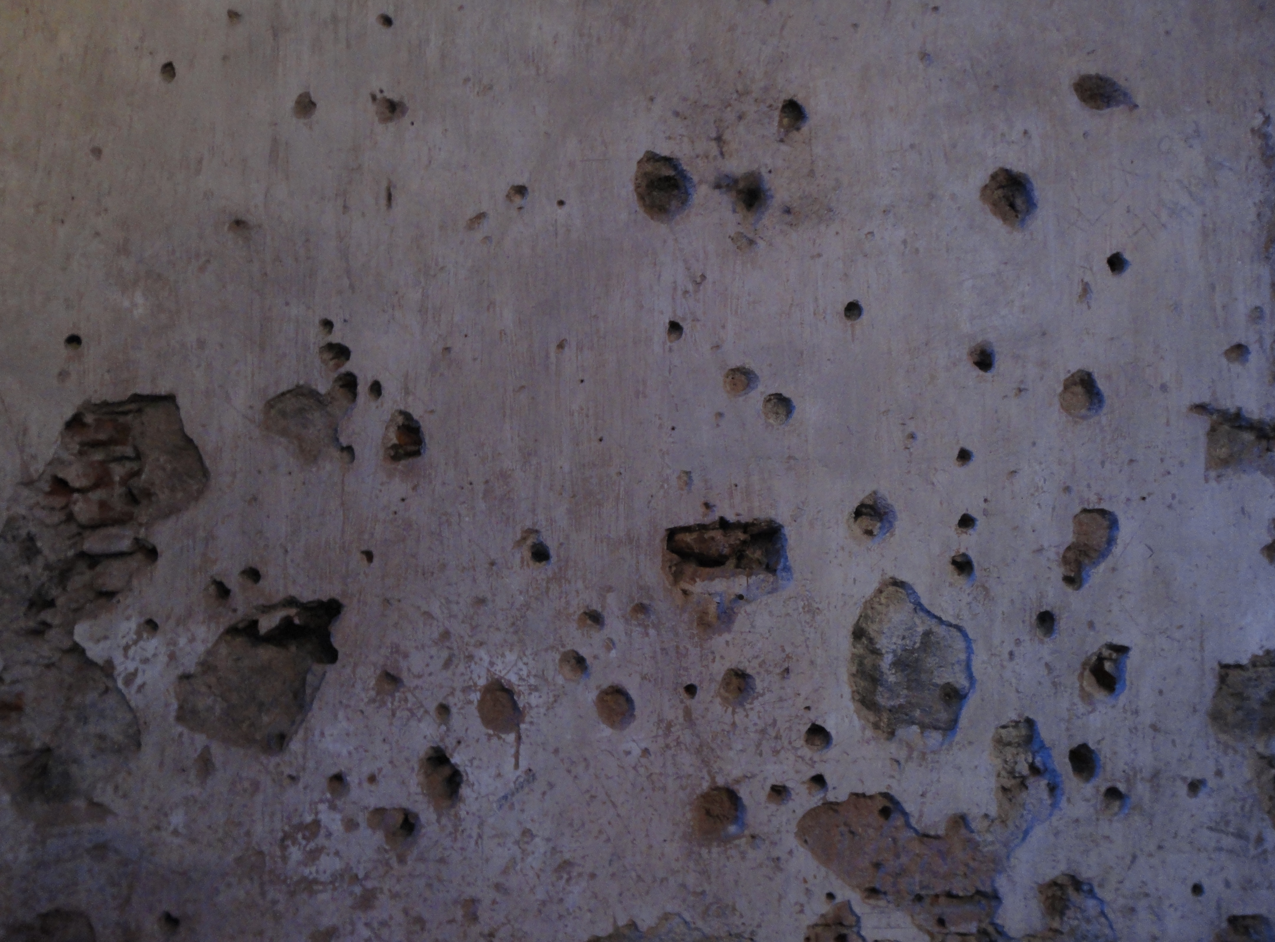 Durante la Guerra Cristera, el ejército utilizó una de las paredes de piedra junto al ábside para convertirla en muro de castigo, donde probablemente cientos de personas murieron por su fe, aún hoy son visibles los agujeros que causaron las balas. Al concluir la edificación del santuario, dicho muro no fue modificado y permanece intacto, como un triste recuerdo de las personas que ahí murieron.